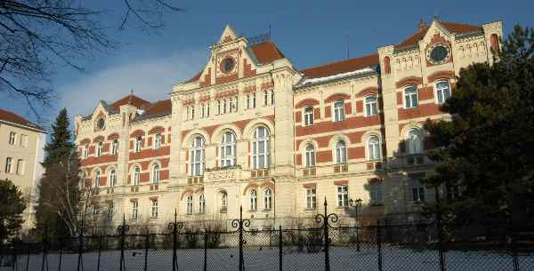 ehem. Kaiser-Franz-Joseph-Landwehrkaserne in der Hütteldorfer Straße 88 im 14. Bezirk in Wien. Heute beherbergt das Gebäude das Geriatriezentrum Baumgarten. Quelle: GuentherZ Fotograf/Zeichner: GuentherZ Datum: 21. Jänner 2006 andere Versionen